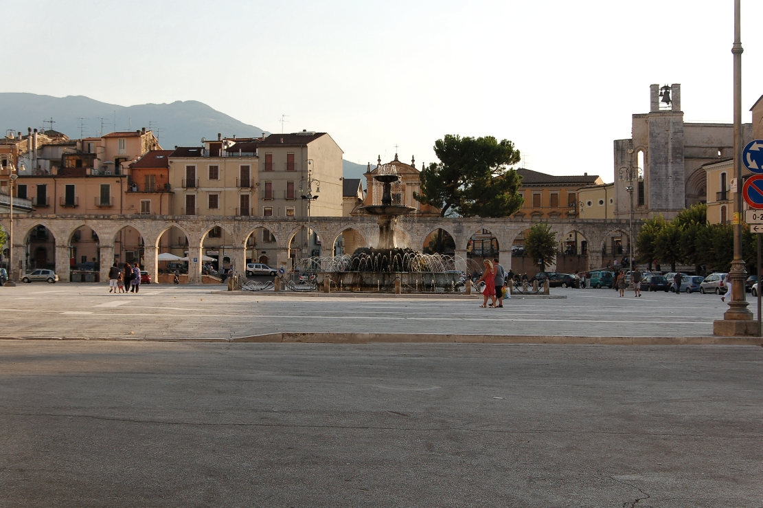 Sulmona 2011